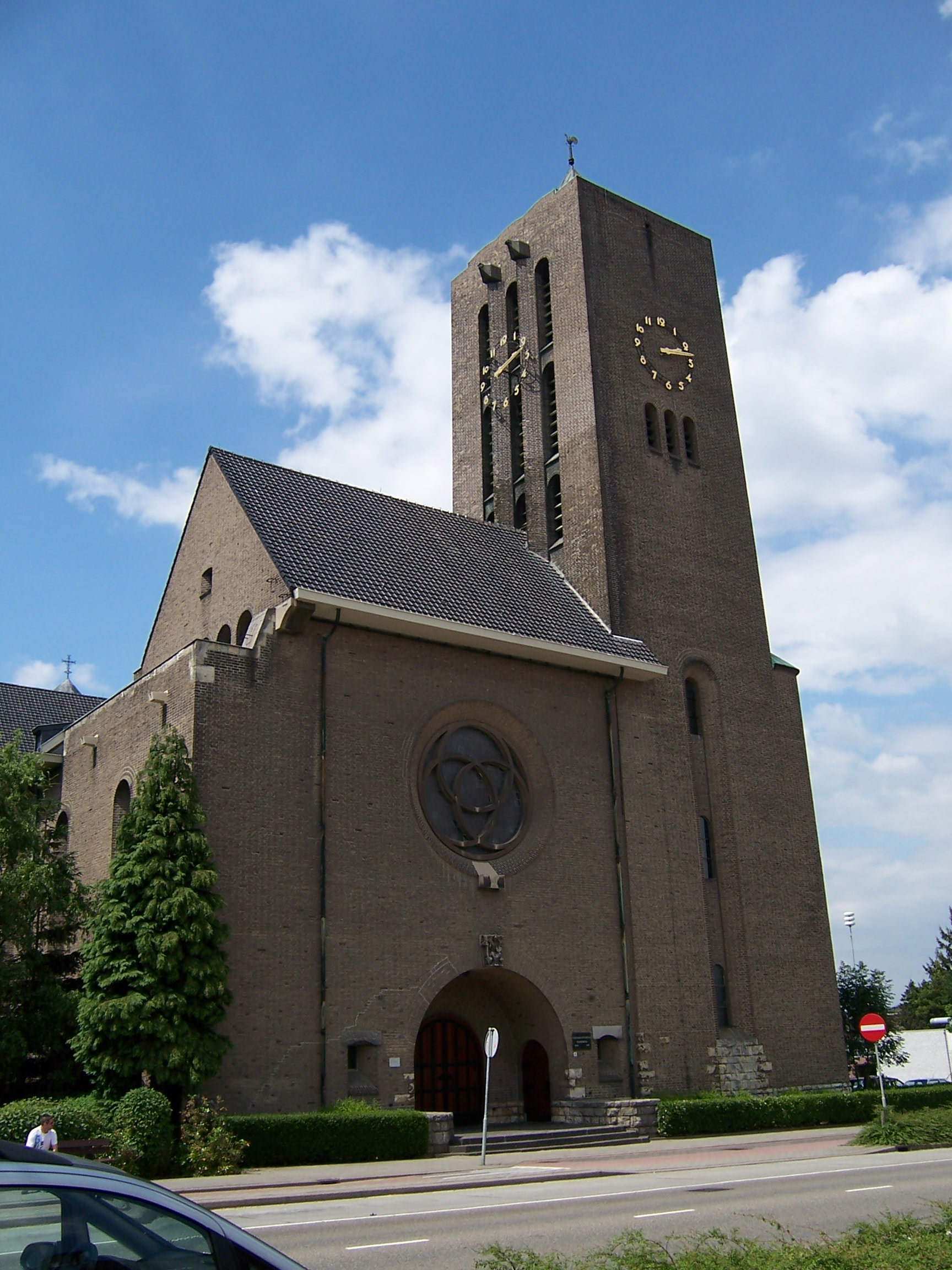 Gerardus-Majellakerk, Heksenberg, Heerlen. Gebouwd in 1936 naar ontwerp van architect Alphons Boosten.